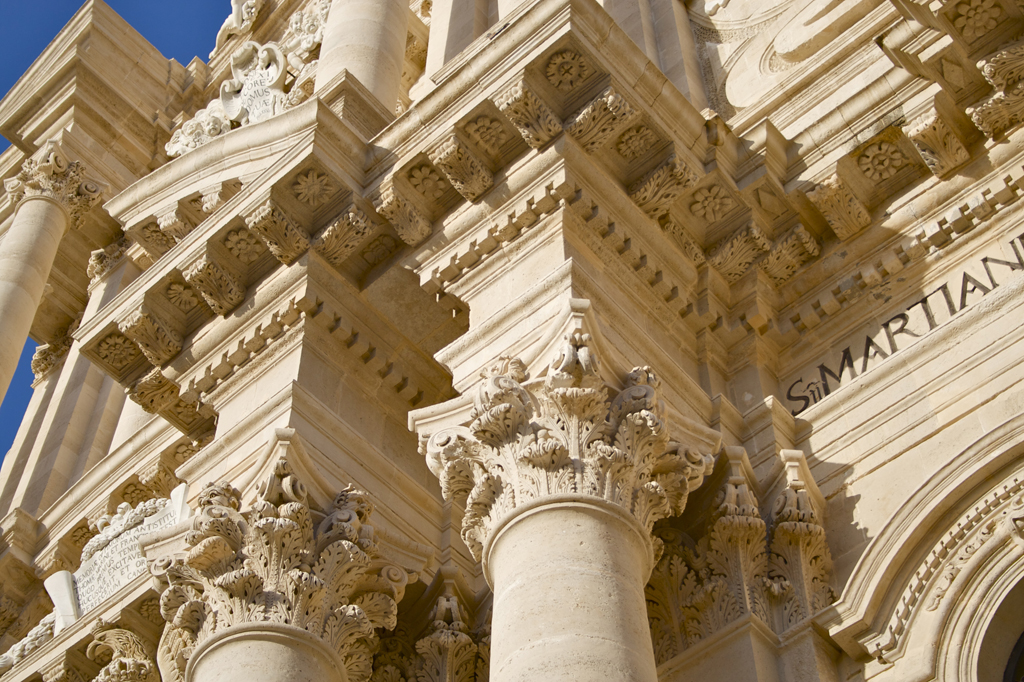 Facciata Duomo di Siracusa